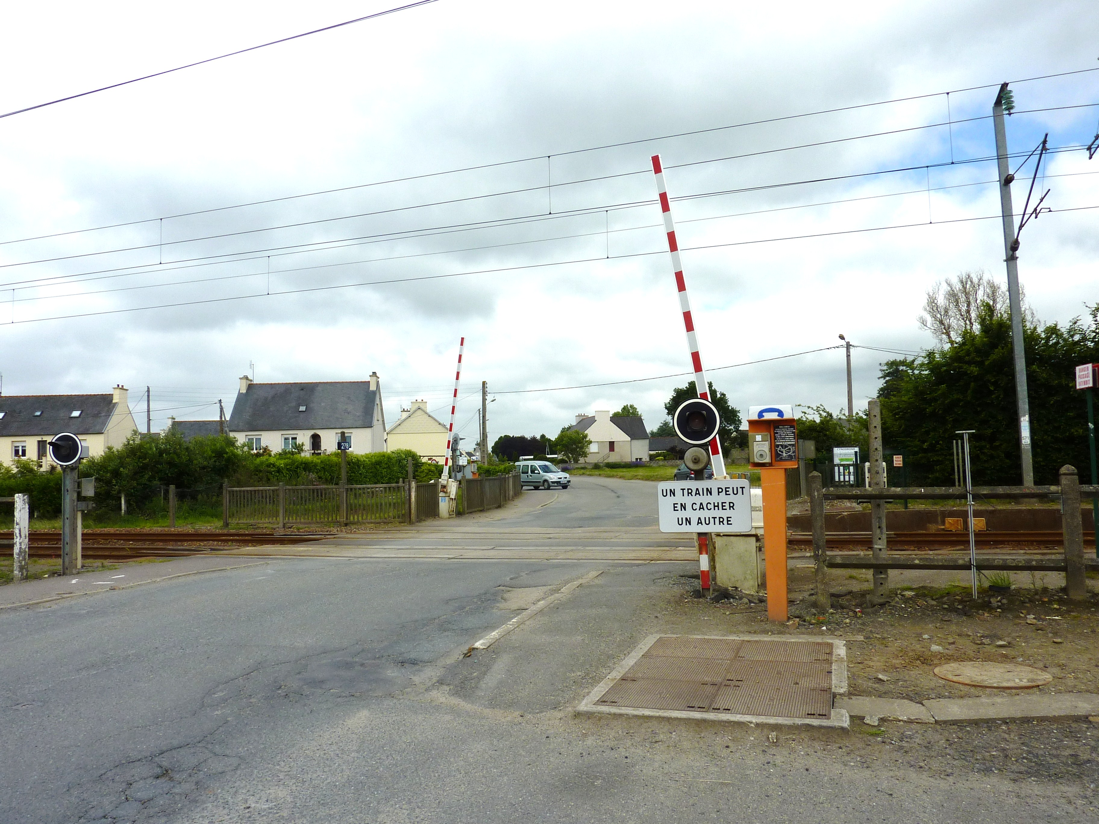 Pleyber-Christ: le passage à niveau sur la ligne Paris-Brest